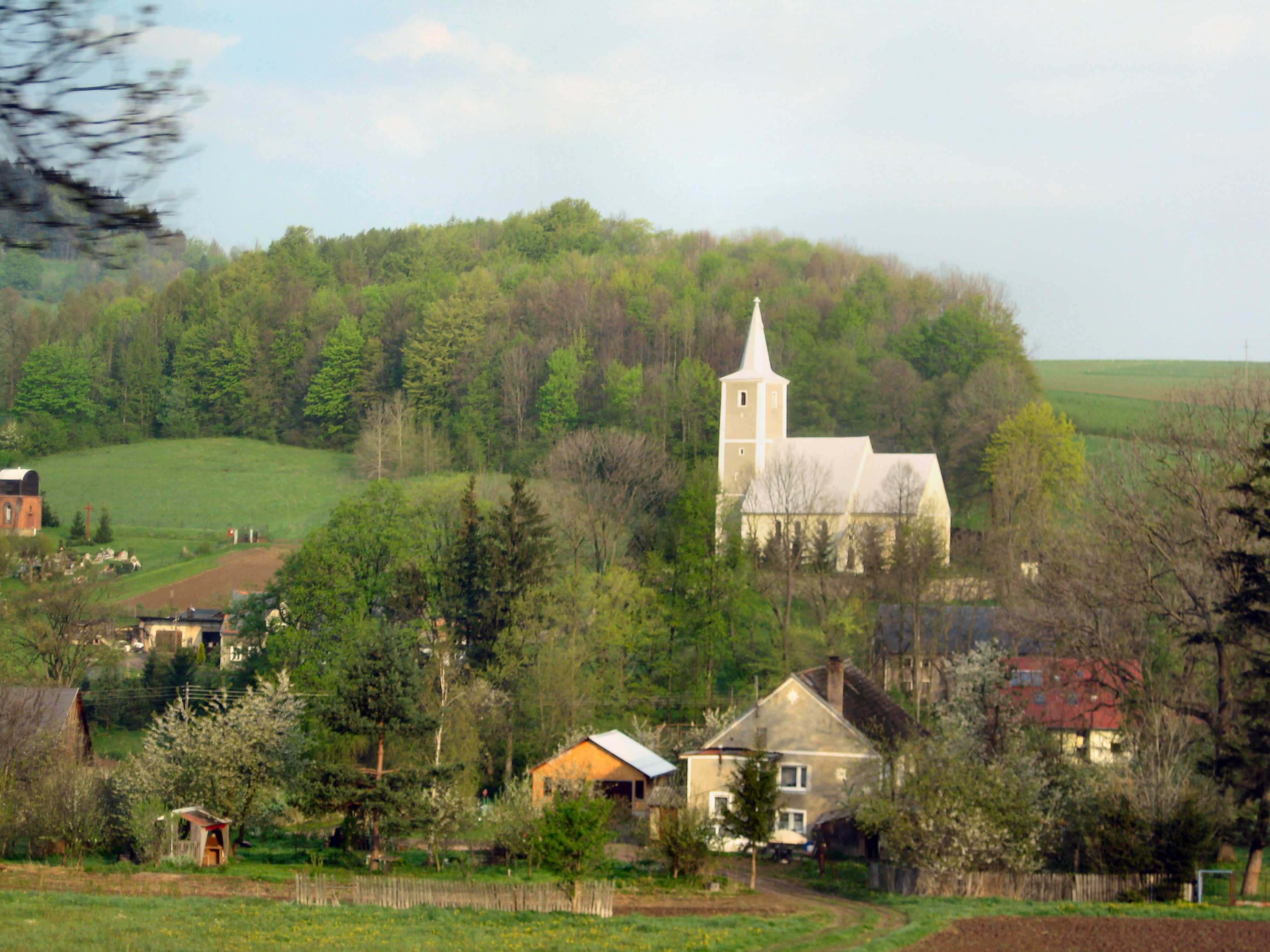 kościół fil. p.w. św. Jana Chrzciciela, XIV-XVII Mysłów, Bolków 07.61.